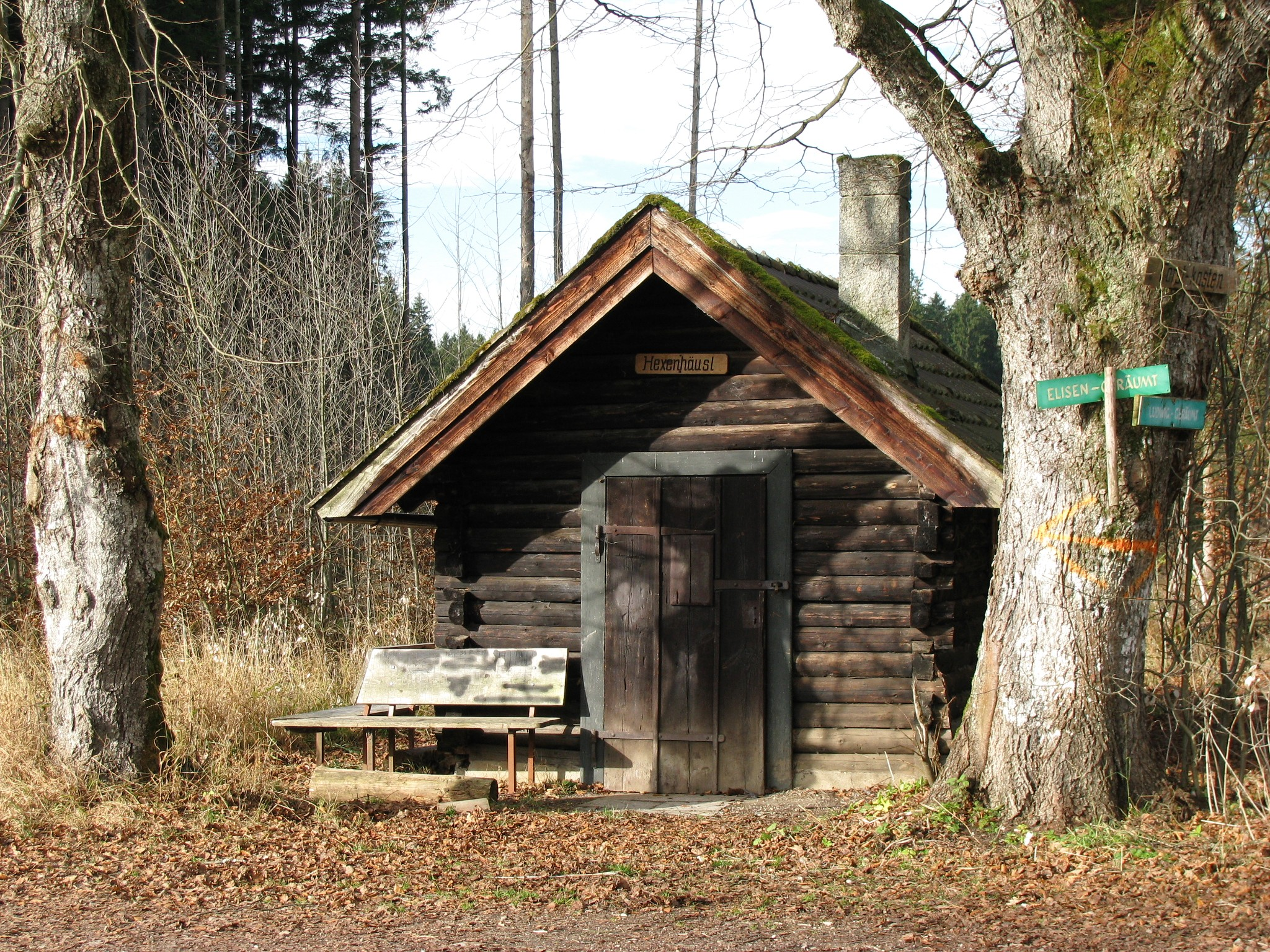 „Hexenhäusl“ im Forstenrieder Park, an der Kreuzung von Elisen- und Ludwigsgeräumt